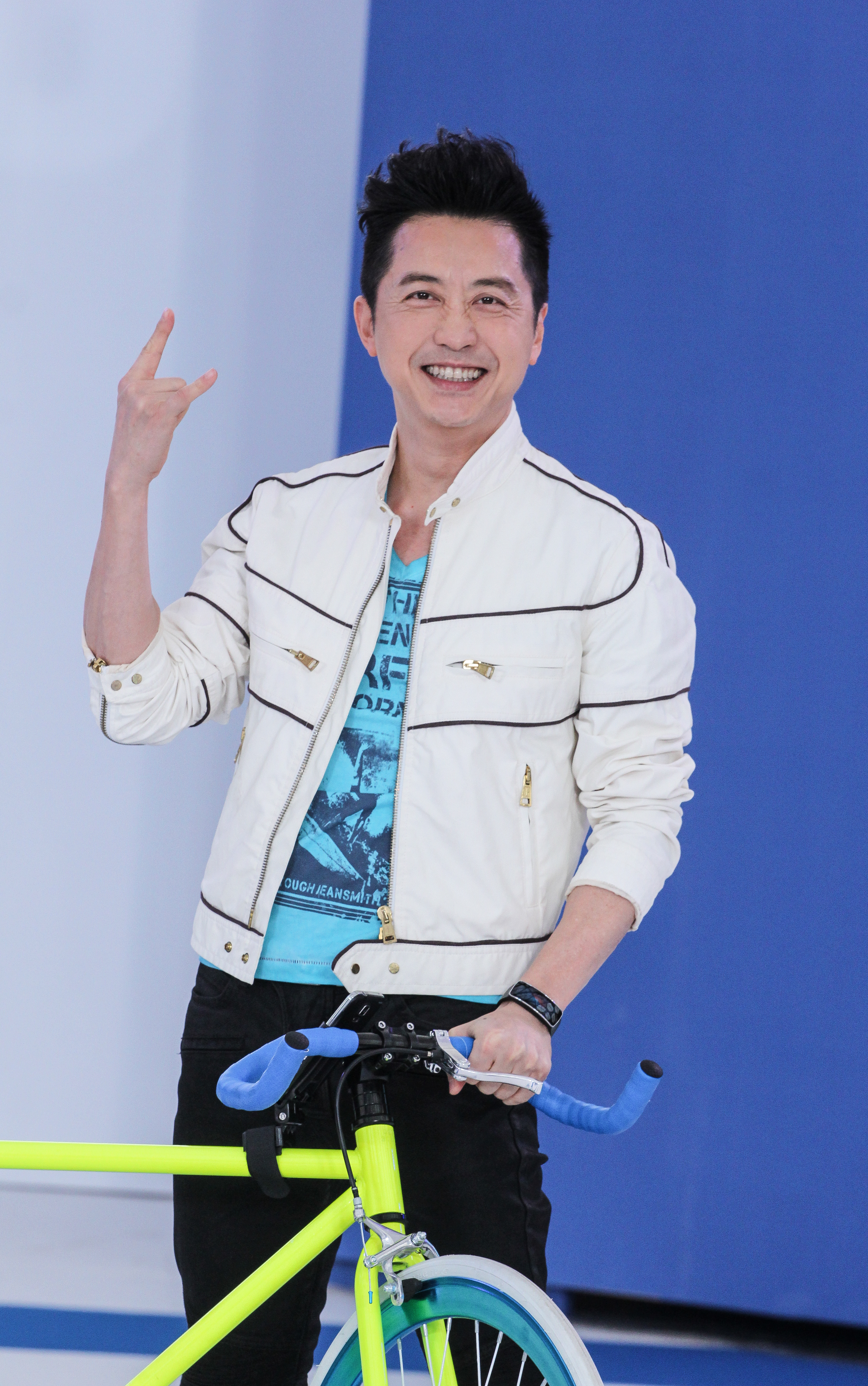 庾澄慶出席台灣三星電子Galaxy S5上市發表會。